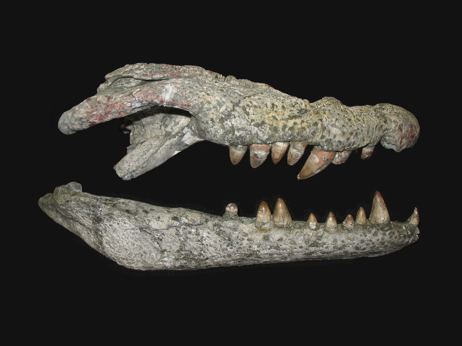 Lohuecosuchus megadontos. Cráneo y mandíbula (holotipo HUE-04498). Vista lateral. Yacimiento de Lo Hueco (Fuentes, Cuenca, España). Ver: Narváez I, Brochu CA, Escaso F, Pérez-García A, Ortega F (2015) "New Crocodyliforms from Southwestern Europe and Definition of a Diverse Clade of European Late Cretaceous Basal Eusuchians". PLoS ONE, 10(11): e0140679.